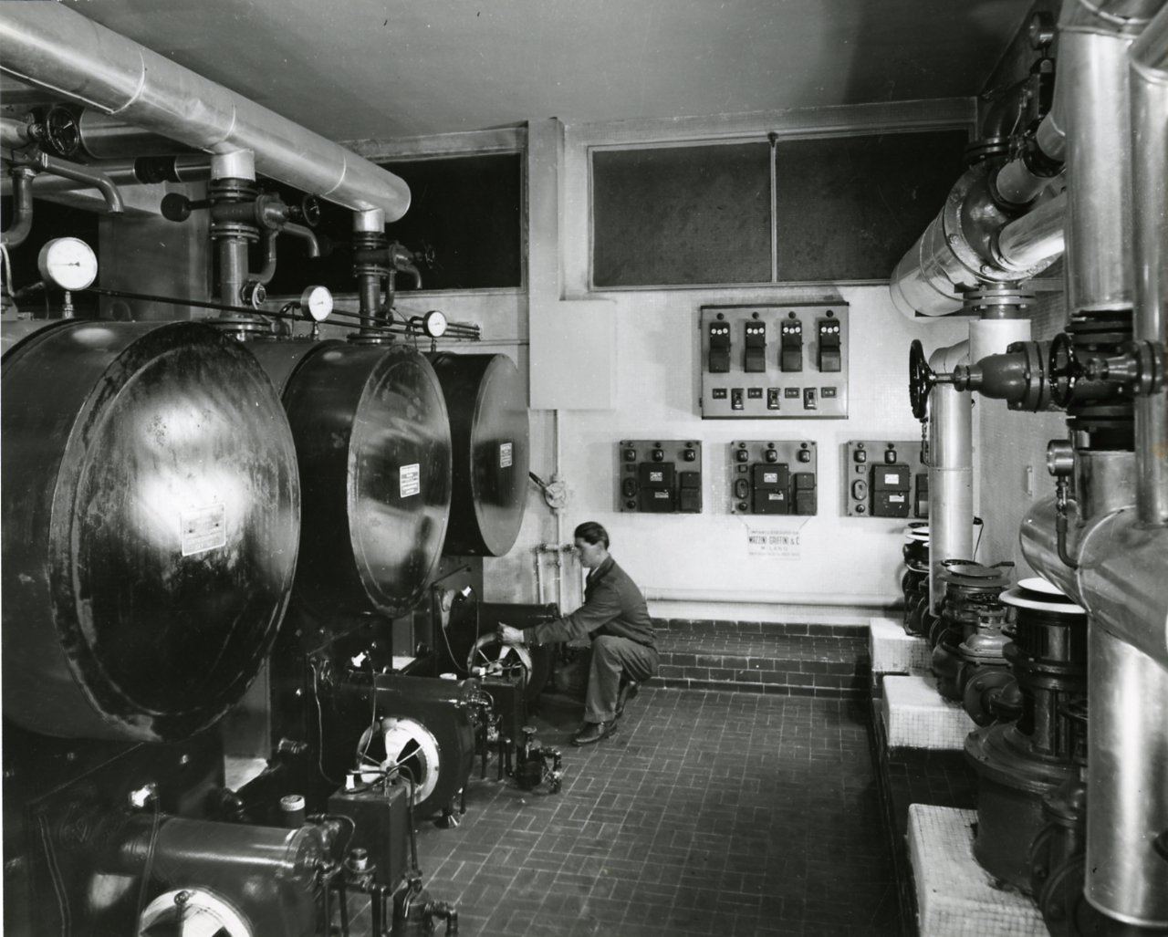 Milano. Lavoratori in un laboratorio chimico e in un'officina meccanica. Serie fotografica : Milano, 1970 / Paolo Monti, Istituto di fotografia Paolo Monti. - Stampe: 4 : Positivo b/n, gelatina bromuro d'argento/ carta, 18x24, 24x30. - ((Sul coperchio della scatola, manoscritto a pennarello: "Milano periferia".